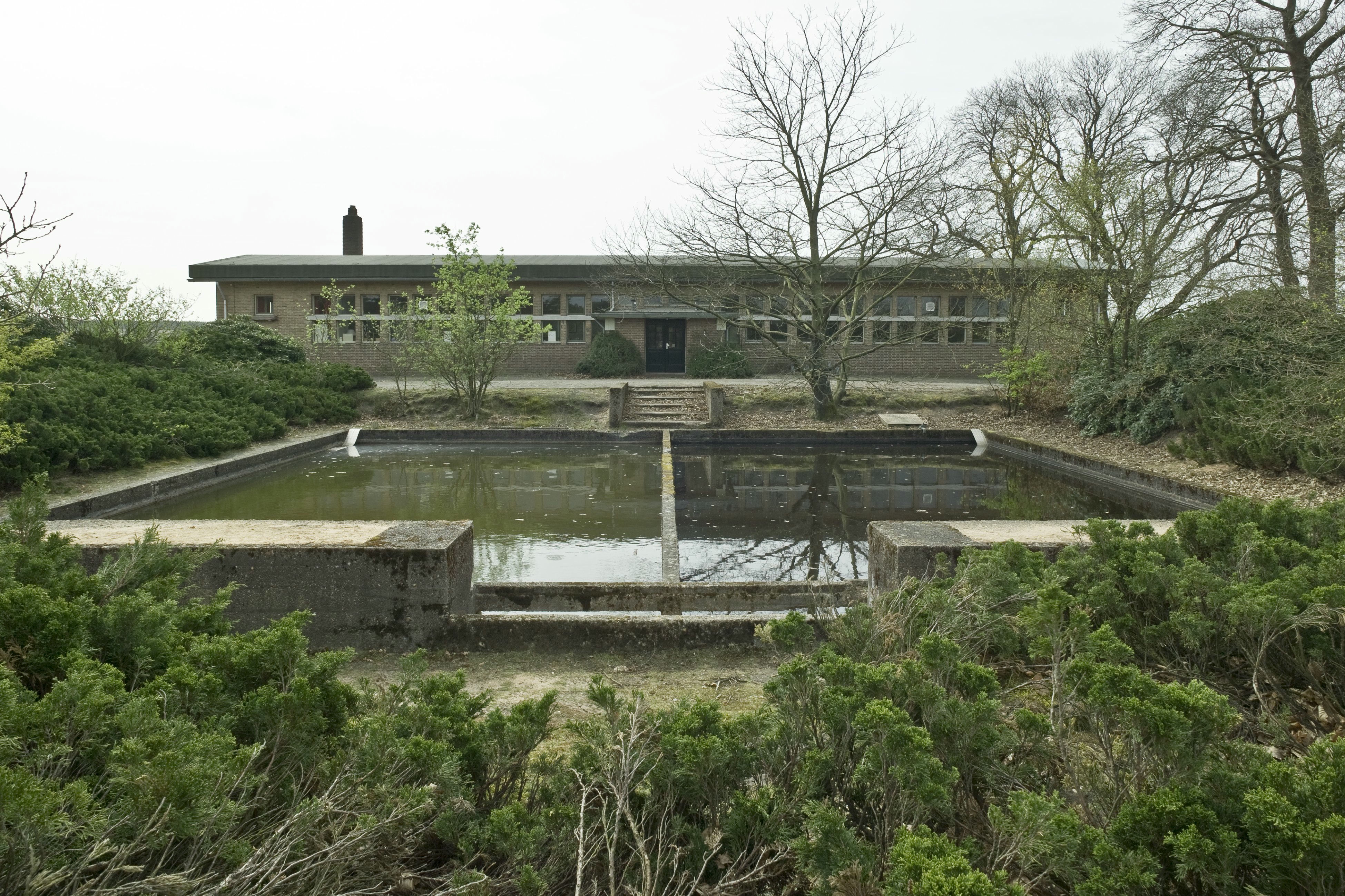 Complex Radio Kootwijk: Overzicht voorzijde Gebouw C met koelvijver (opmerking: Deze opdracht gaat vooral om de bijgebouwen bij Radio Kootwijk)